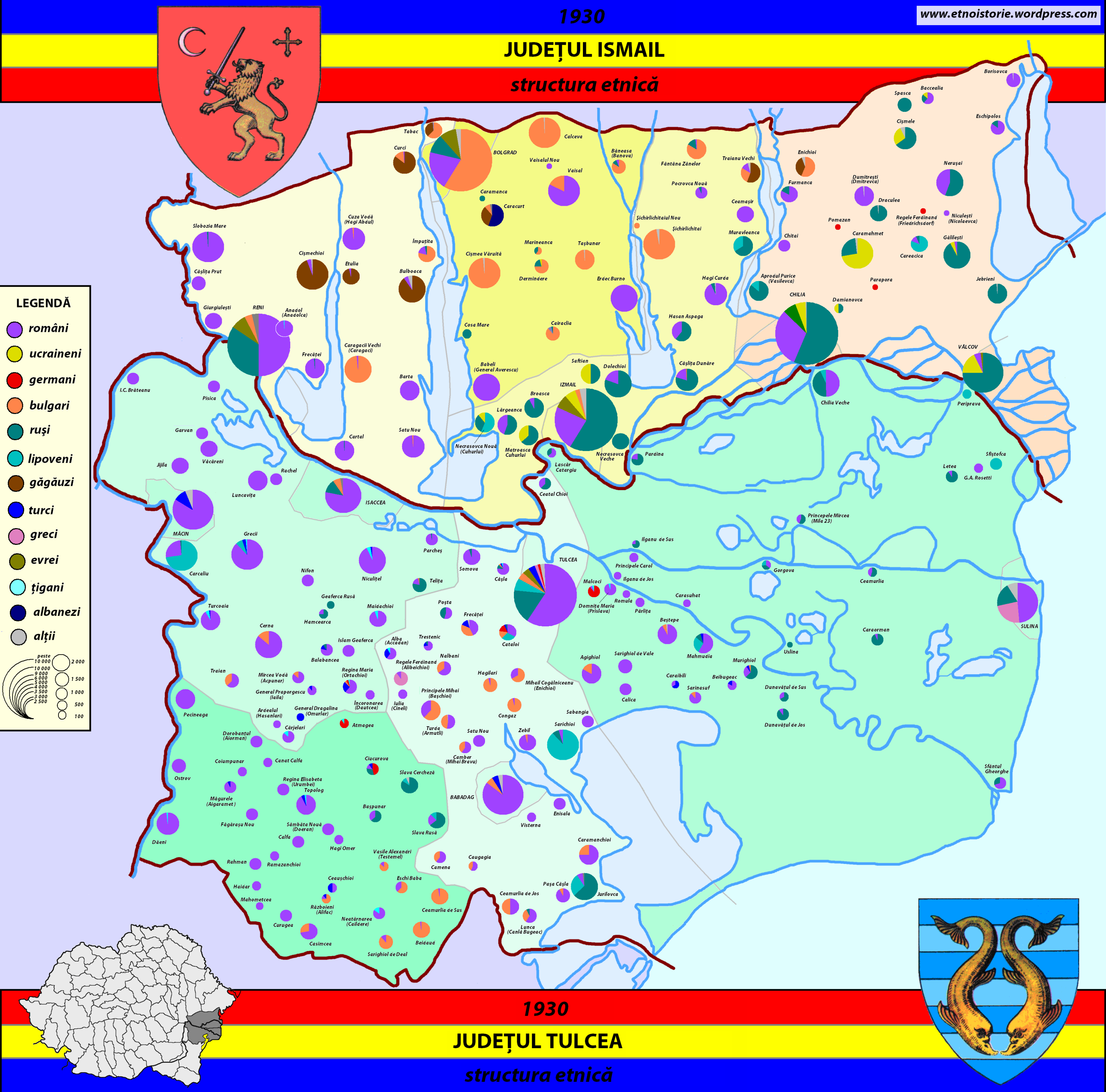 Dunarea_de_Jos_etnic 1930